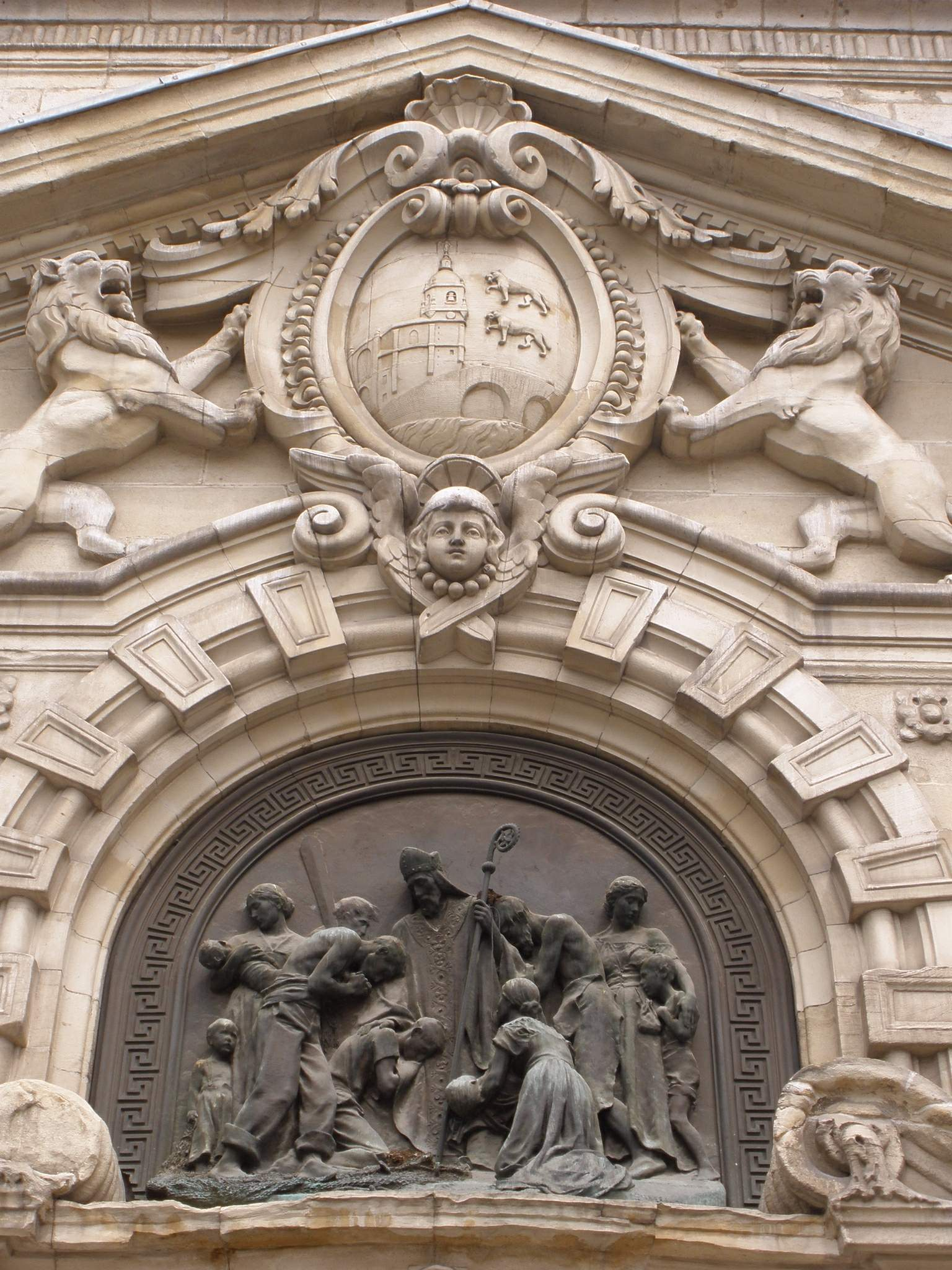 Iglesia de San Nicolás (Bilbao)